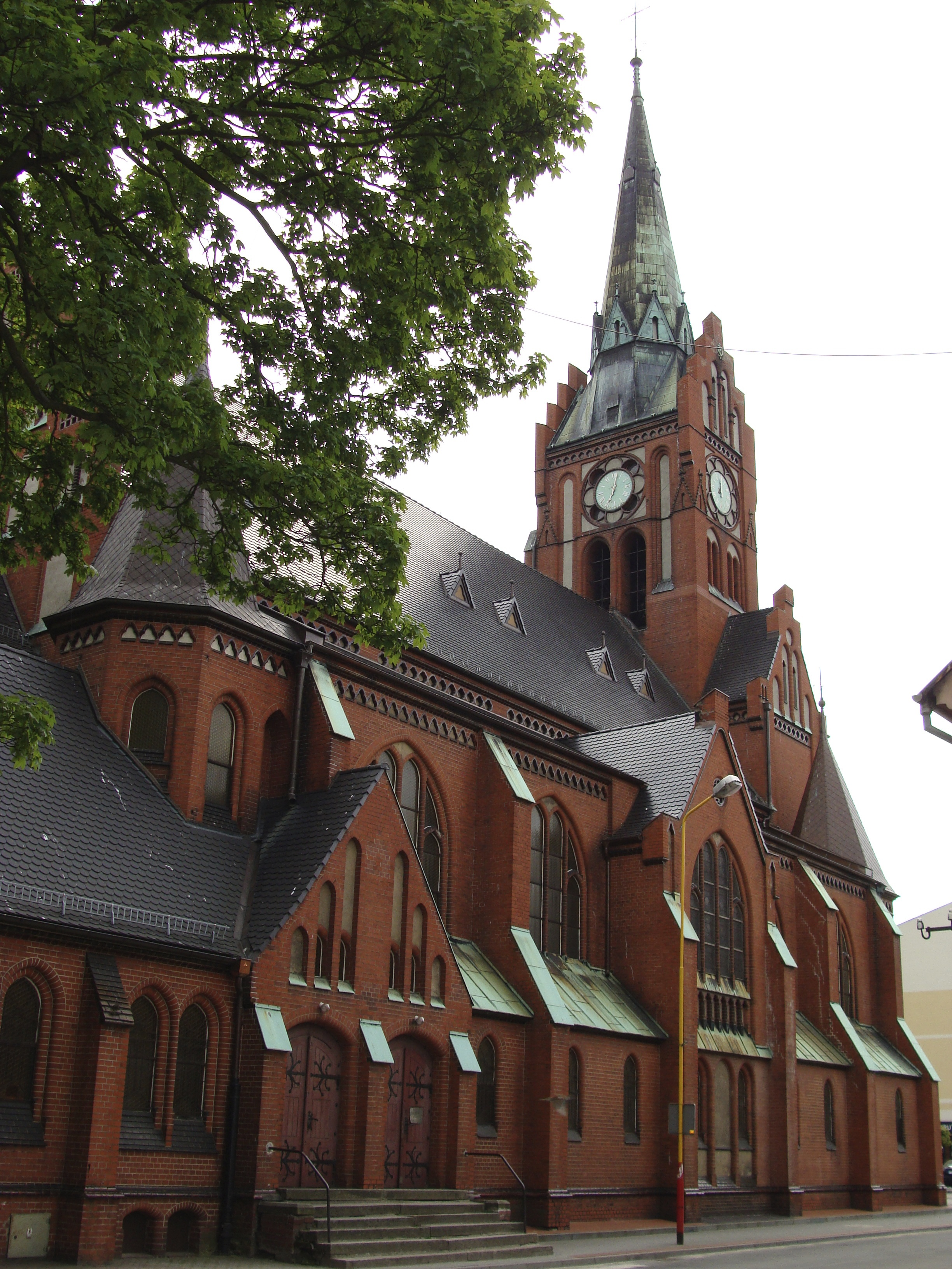 Świebodzin - dawny kościół ewangelicki, ob. rzymskokatolicki p.w. Matki Boskiej Królowej Polski, 1898-1900 (elewacja północna)